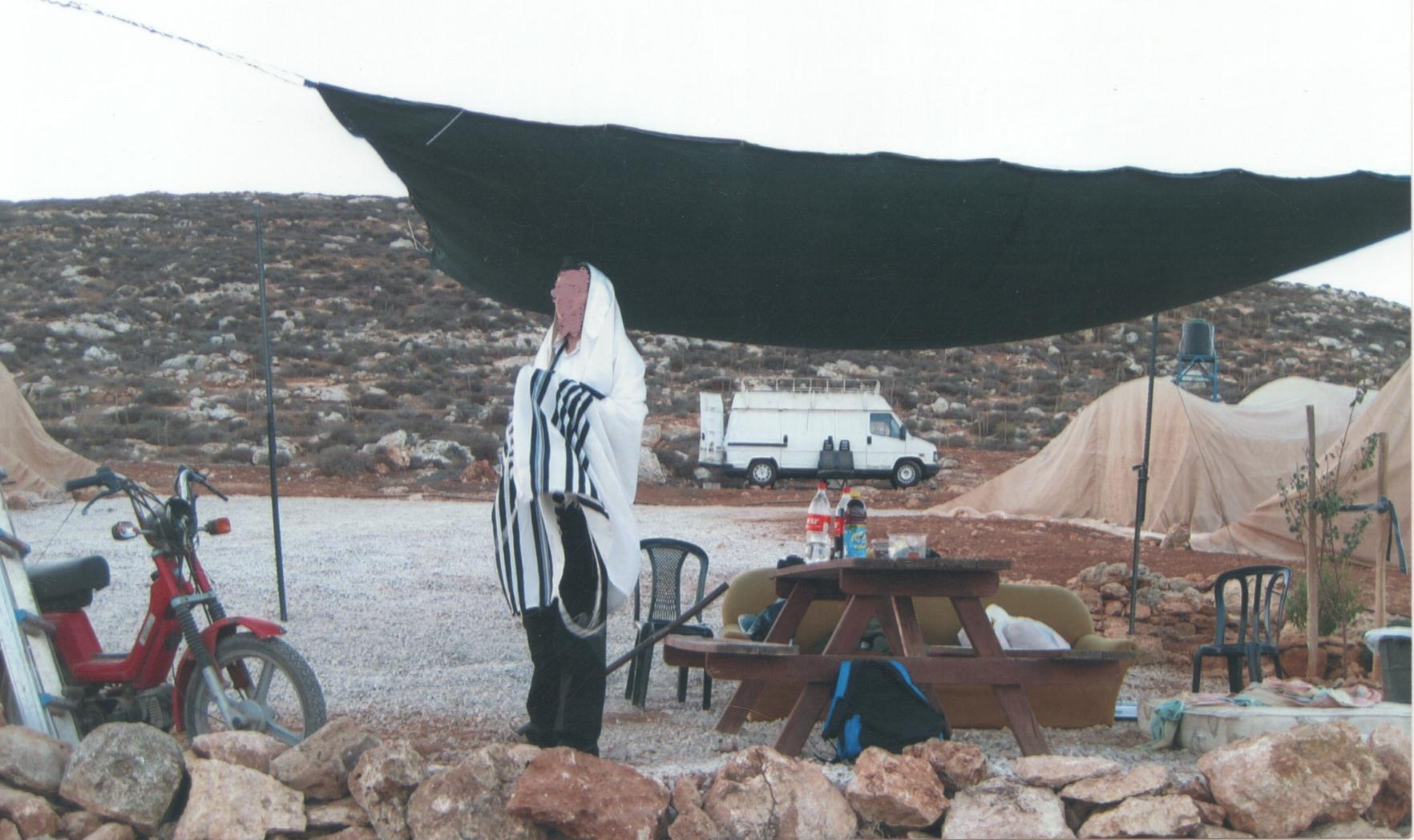 גבעת גל יוסף במזרח גוש שילה בבנימין